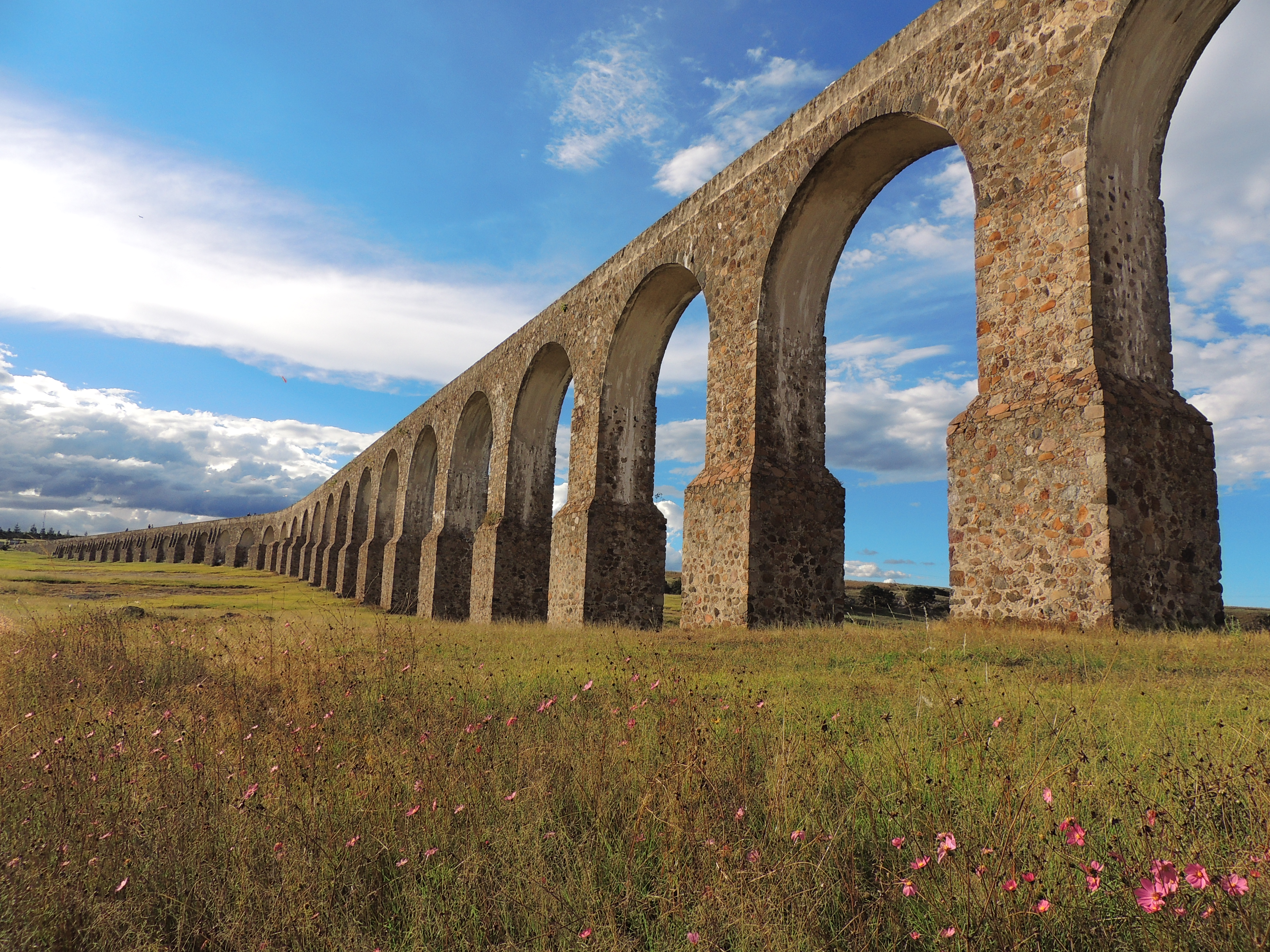 Hermosa postal de los Arcos del sitio en Tepotzotlán, Estado de México.